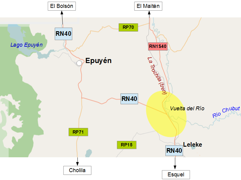 Mapa de la ubicación del Pu-Lof de Cushamen (Chubut)